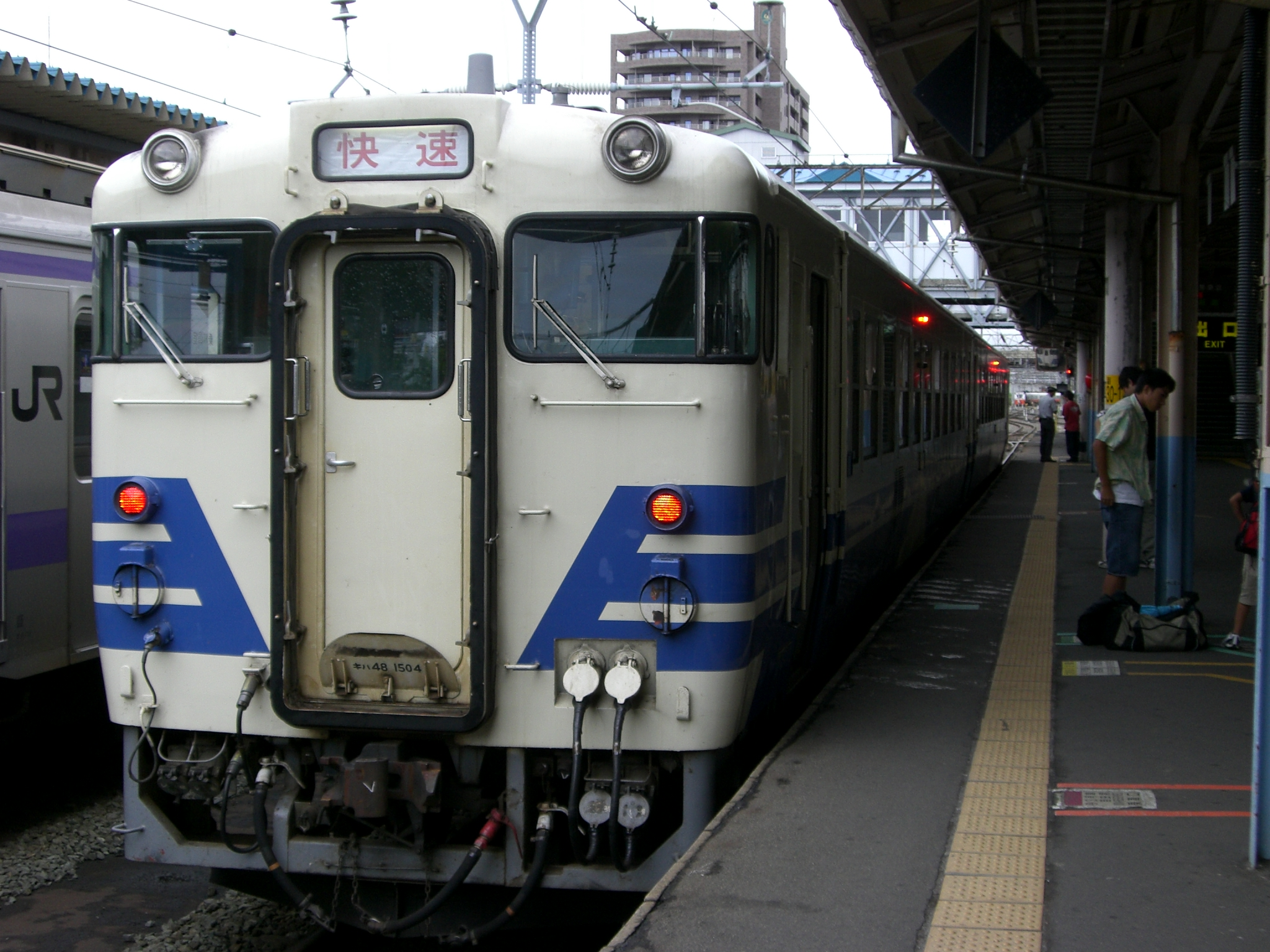 High-SPEED train Hukaura(快速深浦)